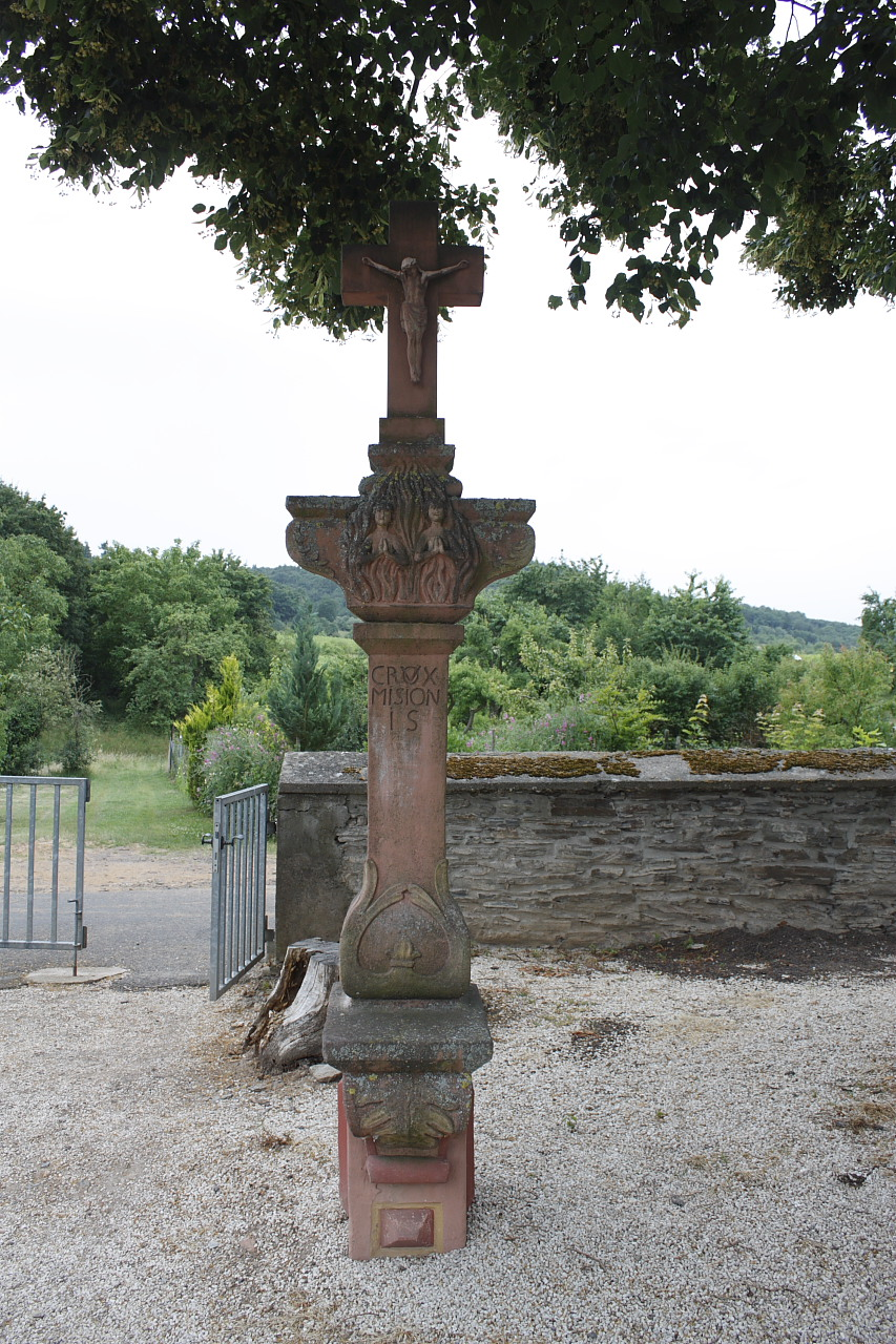 Flurkreuz auf dem Lösnicher Friedhof 2014